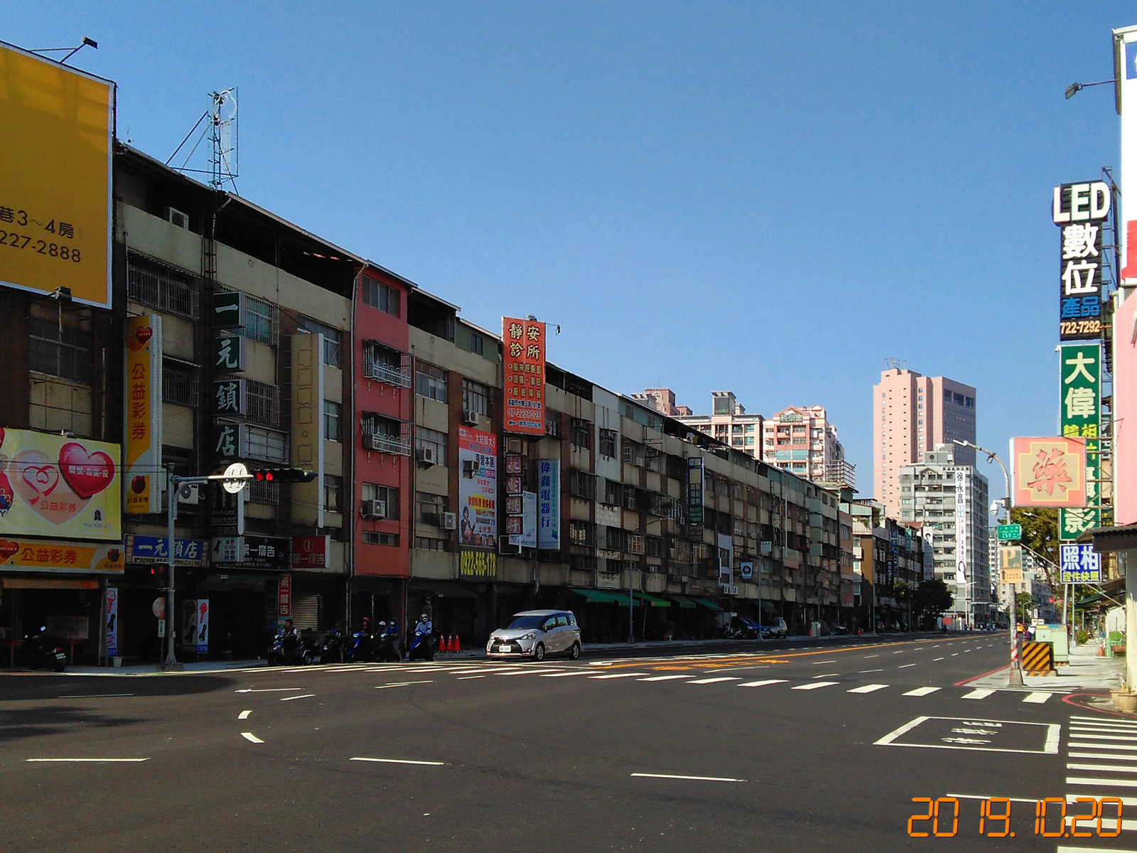 大順陸橋拆除恢復平面後2019年10月現況